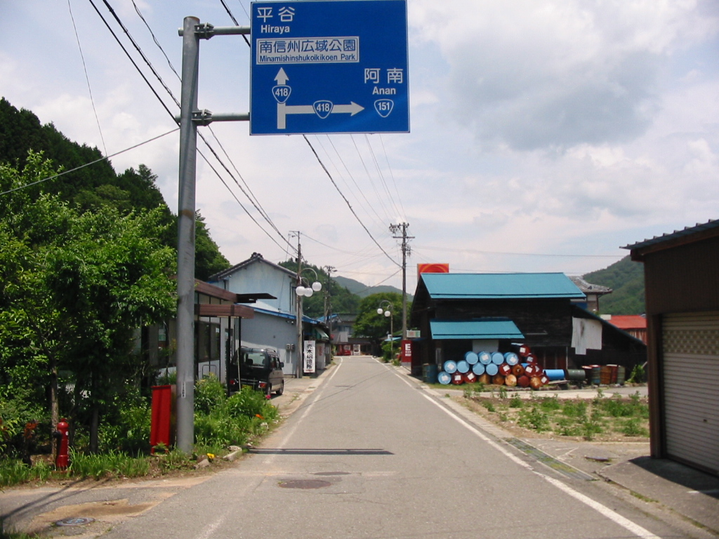 国道418号交点付近